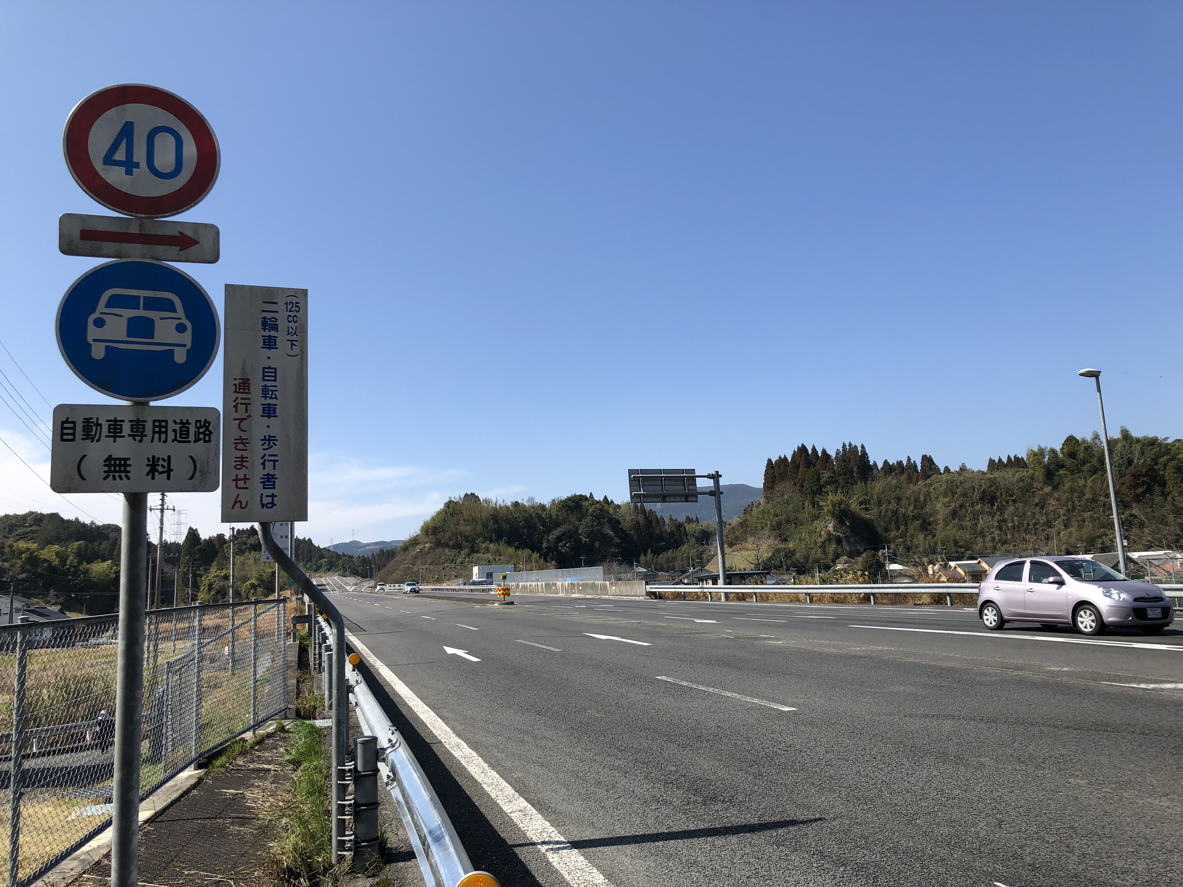 南九州西回り自動車道薩摩川内都ICの入り口